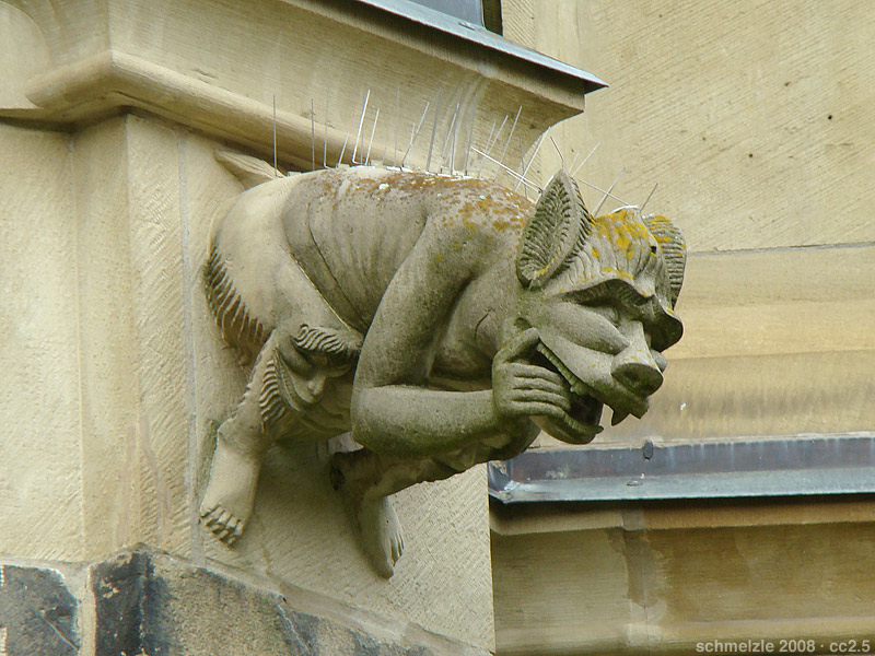 Stiftskirche St. Peter, Bad Wimpfen, Figur am Südgiebel